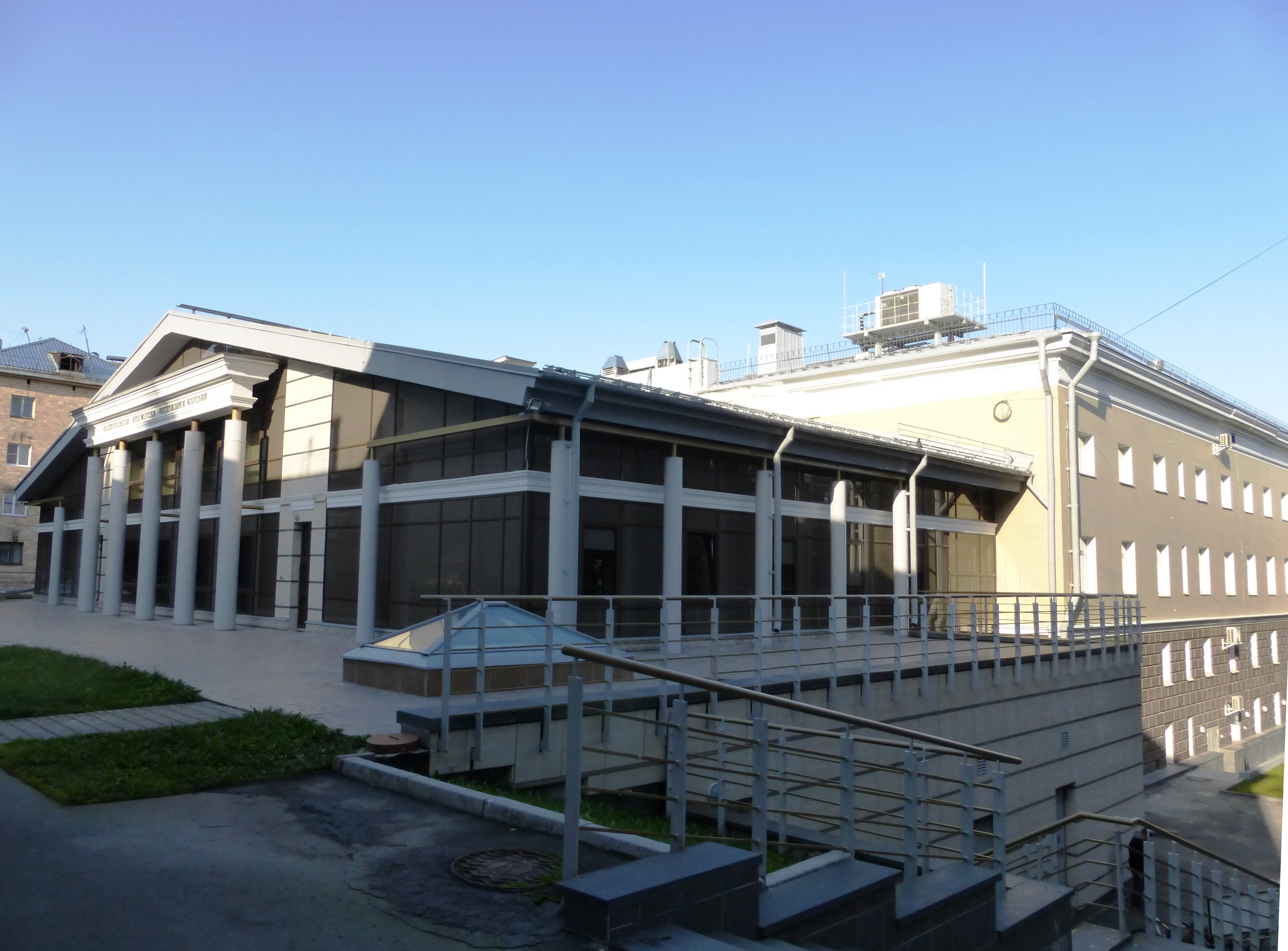 Здание Национальной библиотеки Республики Карелия в Петрозаводске на ул.Пушкинской (пристройка). Вход со стороны ул. Куйбышева